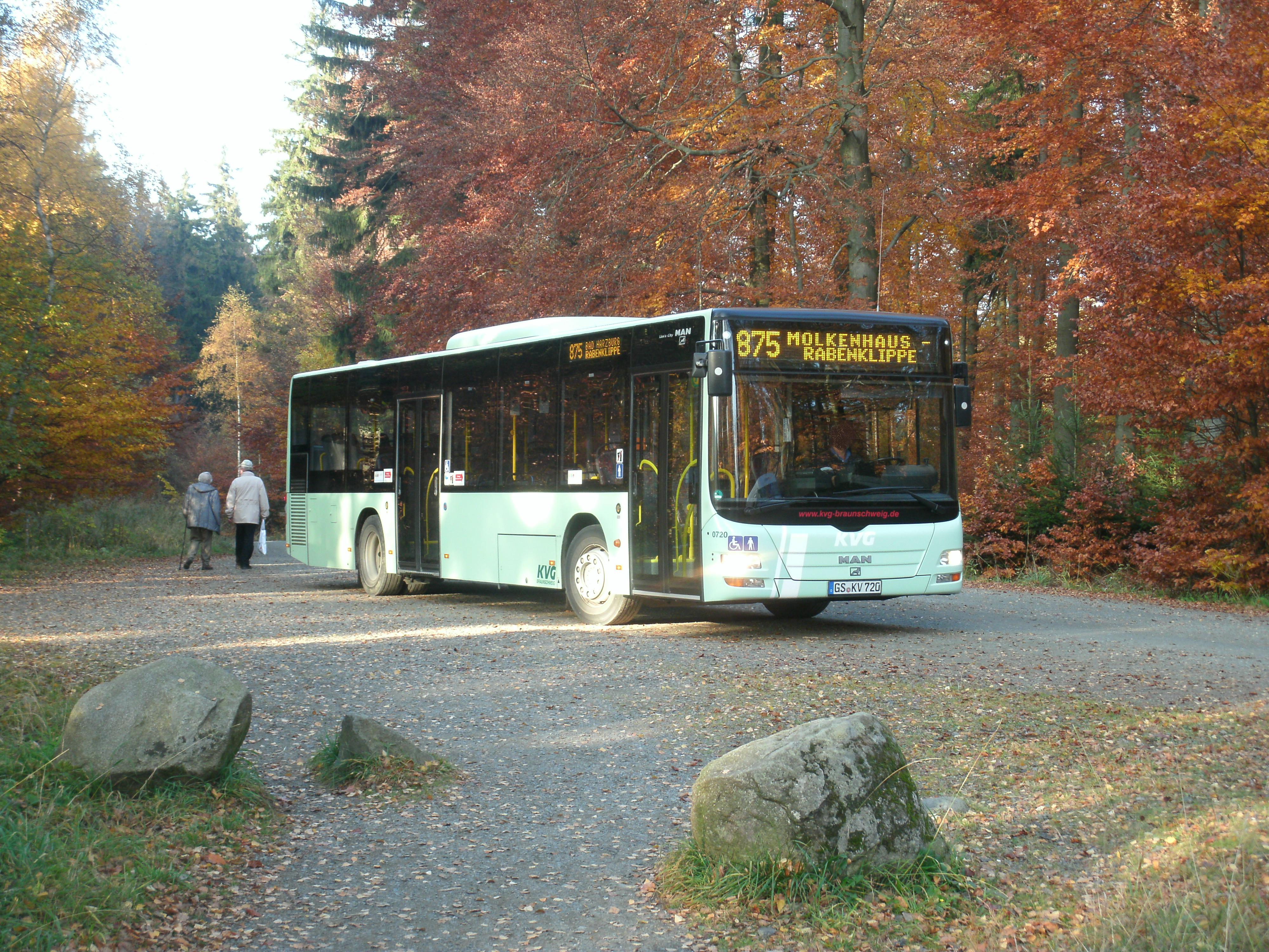 Linienbus der KVG (Grüner Harzer) auf der Sommerlinie 875 im Nationalpark Harz am Molkenhaus auf der Fahrt zur Rabenklippe